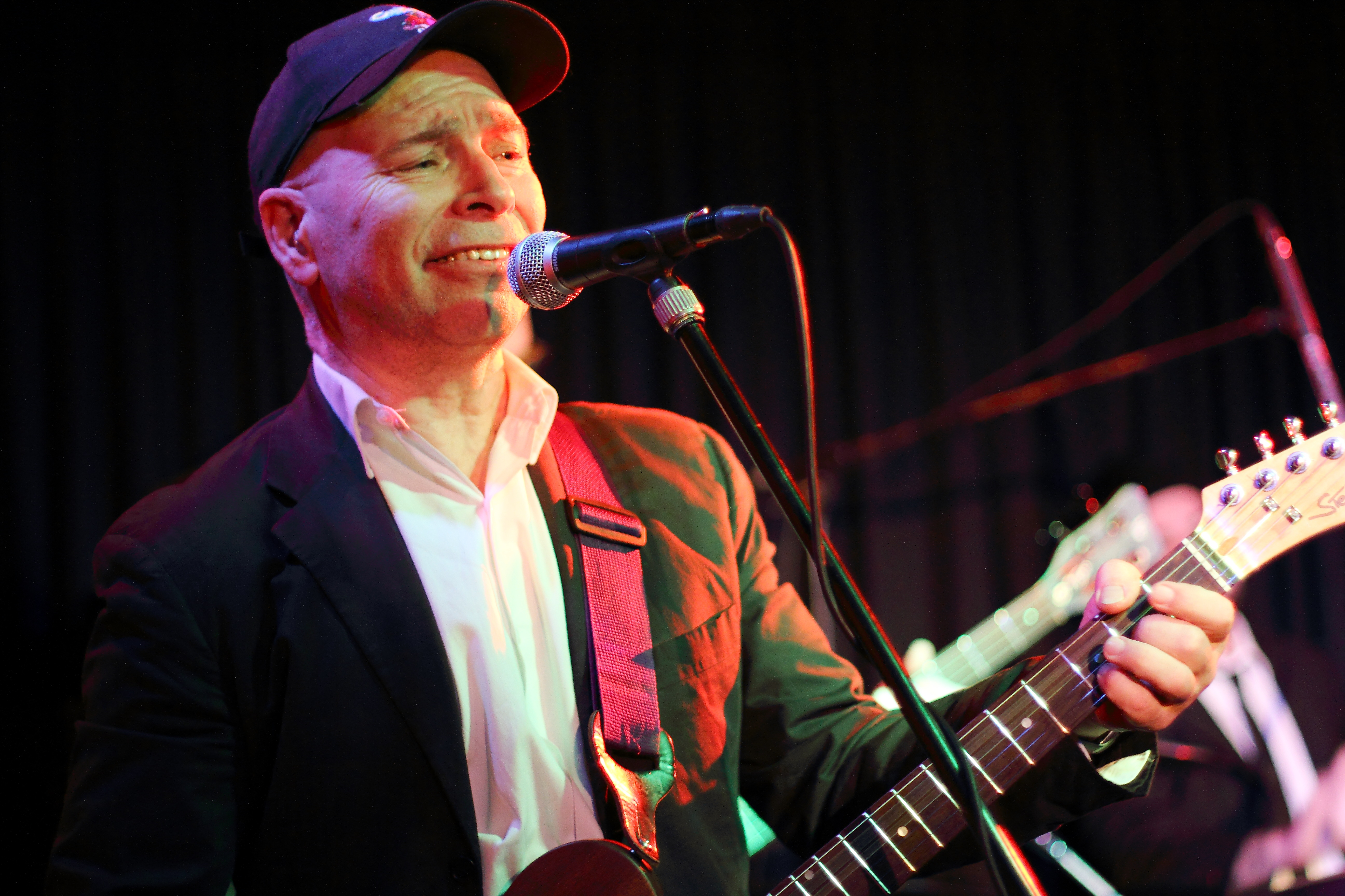 Die Soul-Punk-Band Family 5 um Peter Hein und Xao Seffcheque beim Auftritt im Club W71, Weikersheim.